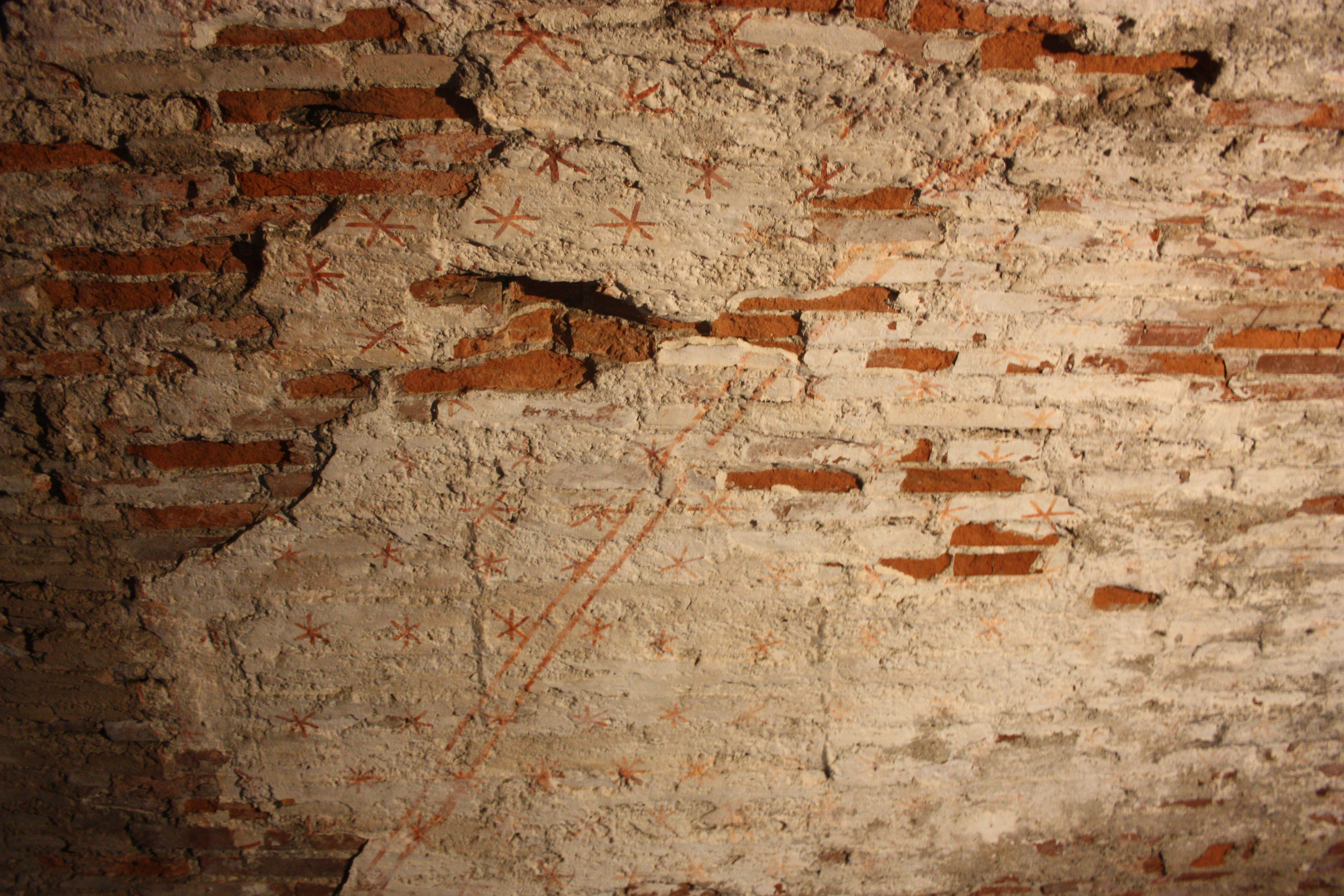 Peinture murale sur la voûte de l'autre côté des deux cartes du ciel de la basilique Saint-Sernin.